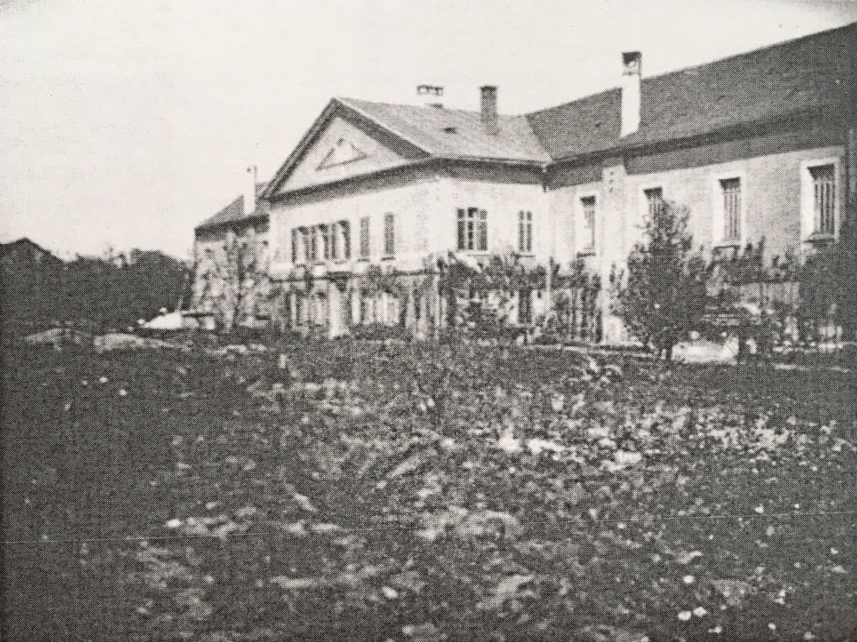 Eine Fotografie aus dem Nachlass von Schlossgarteninspektor Alfred Ehmann.